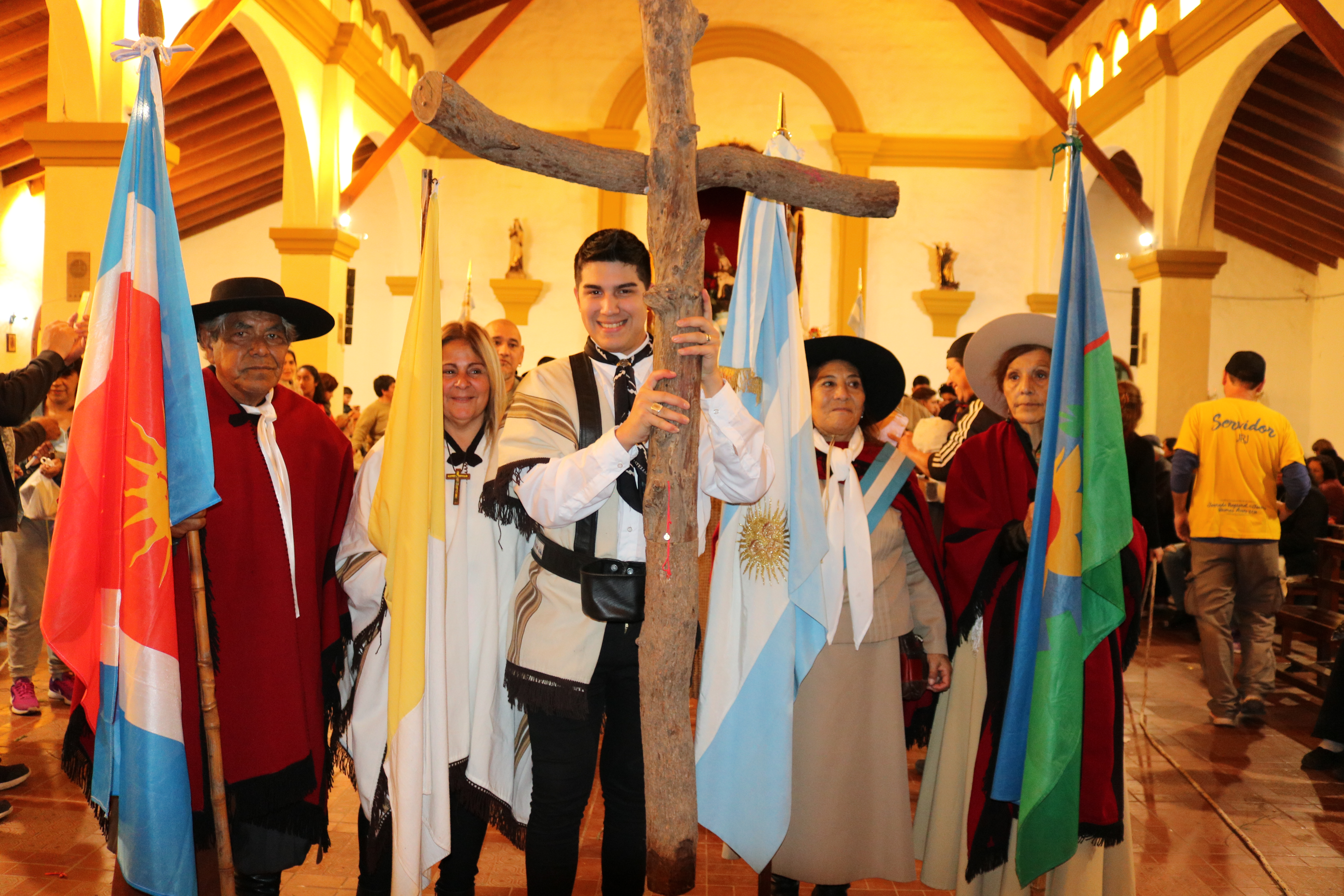 SEÑOR DE MAILÍN, PALABRA DE VIDA DE TU PUEBLO